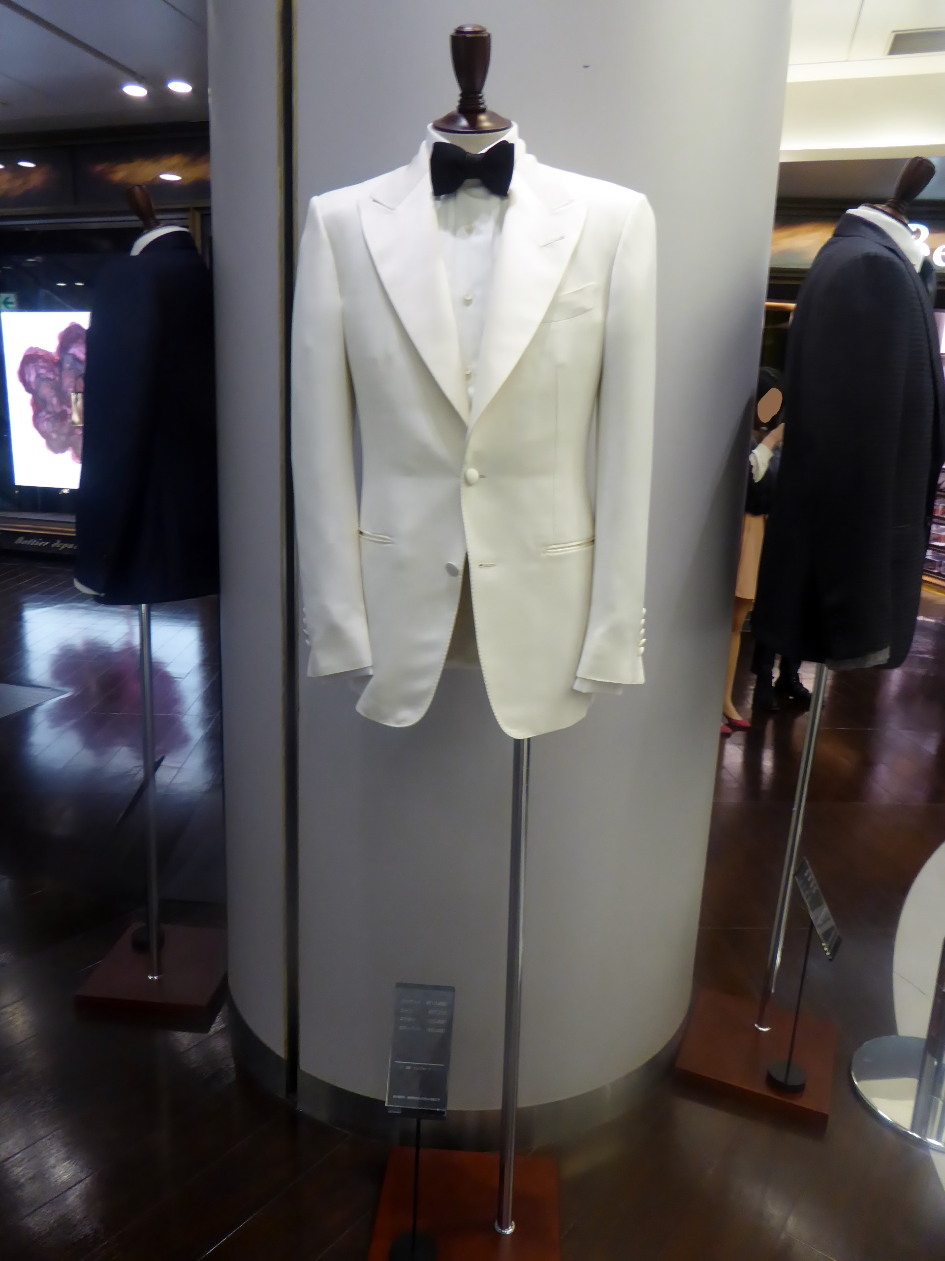 「007 スペクター」においてジェームズ・ボンドが着用した仕様の服を撮影。